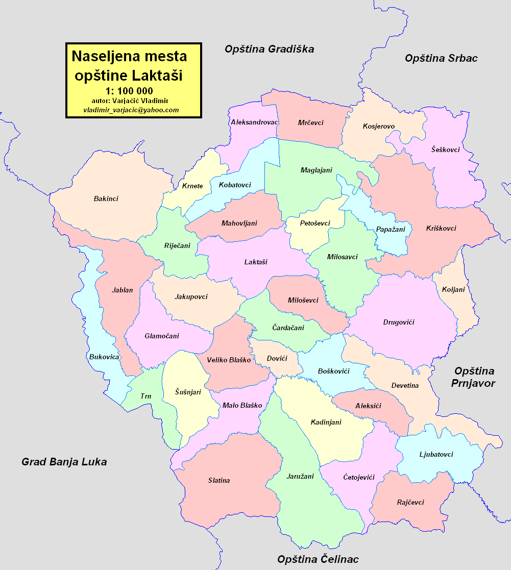 Opština Laktaši